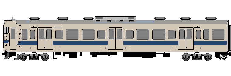 瀬戸内色大型ライト車